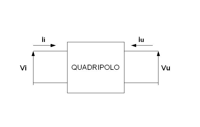 quadripolo